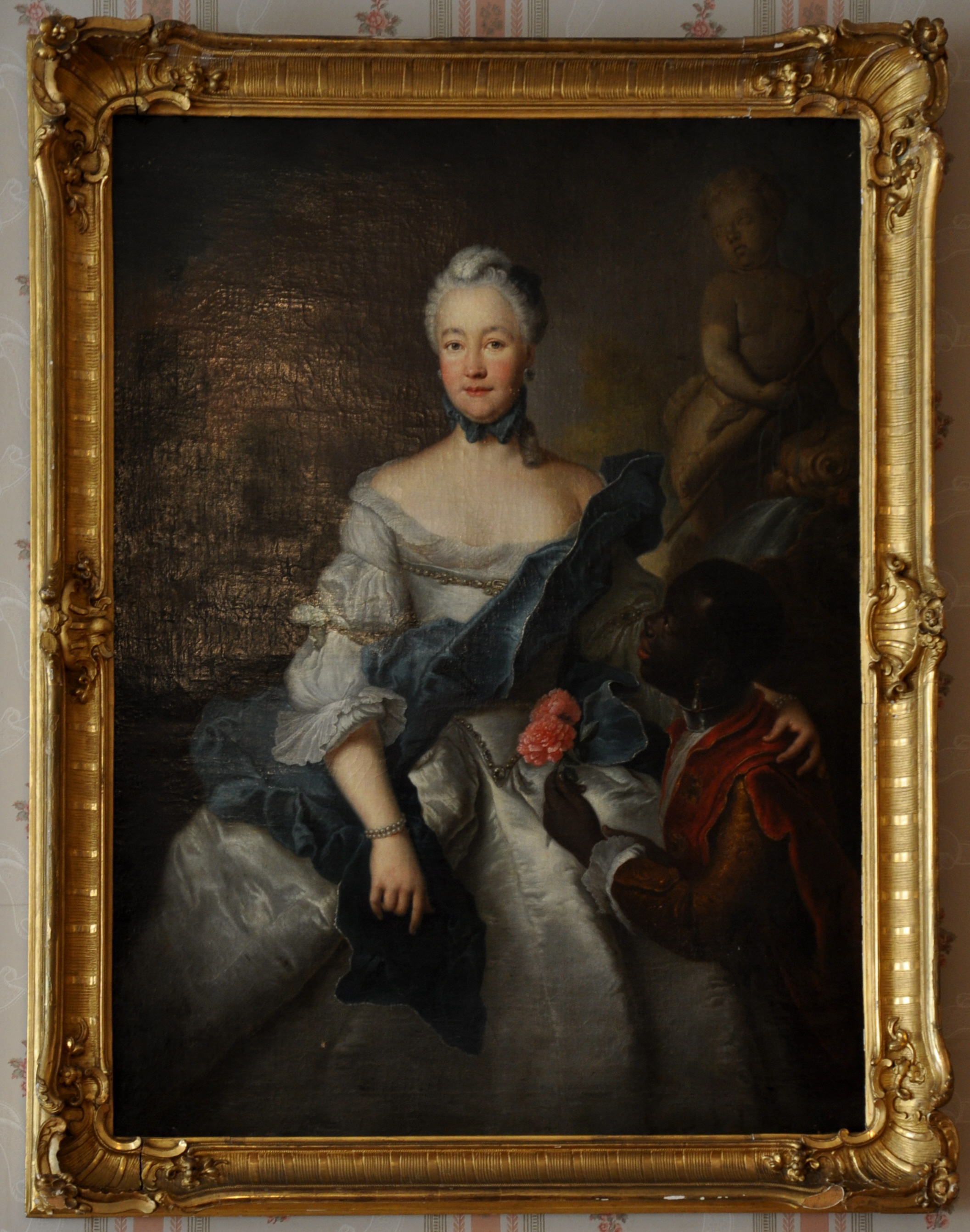 Caroline von Hessen-Darmstadt (die „große Landgräfin“) mit ihrem Mohren, um 1750